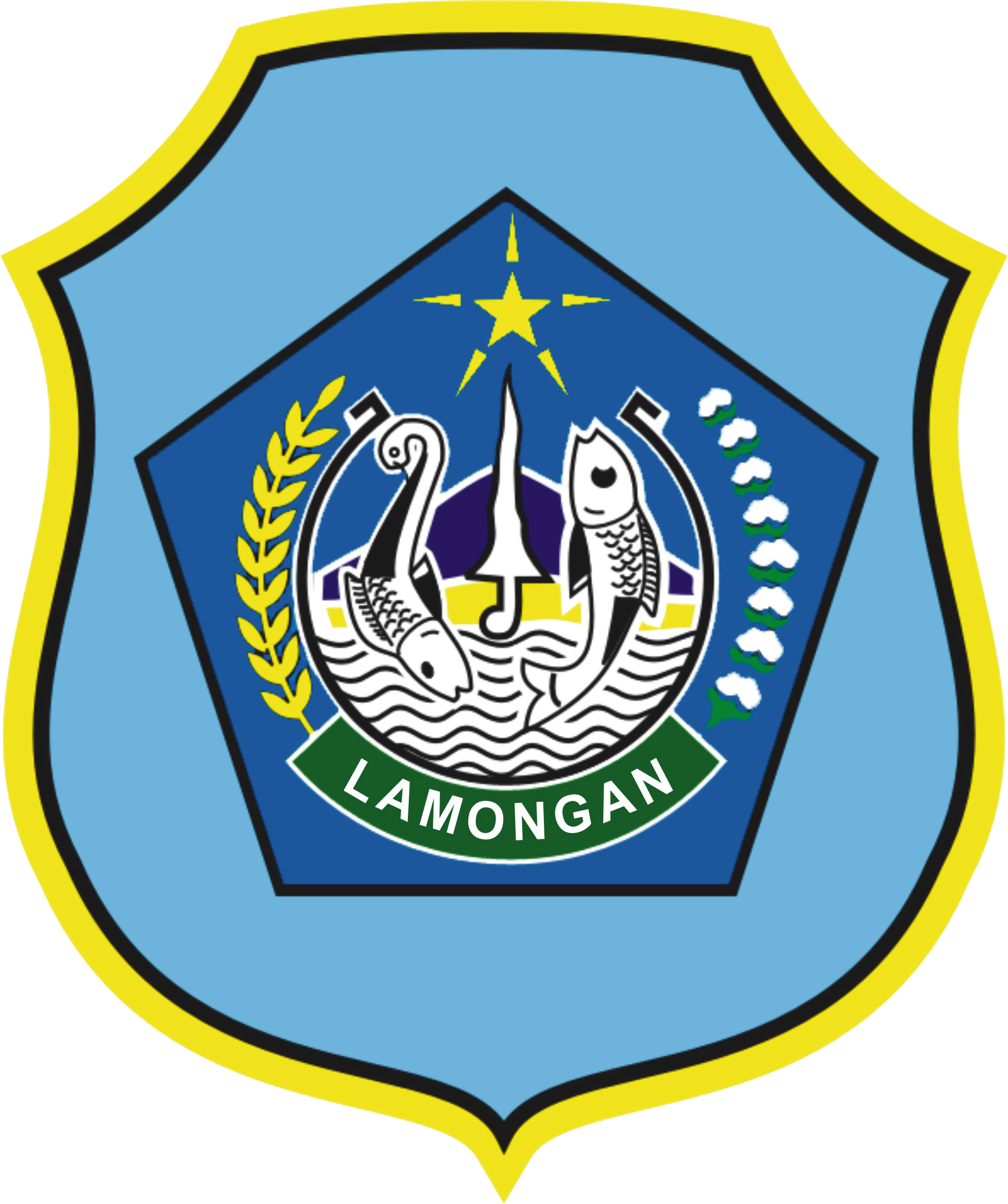 Lamongan